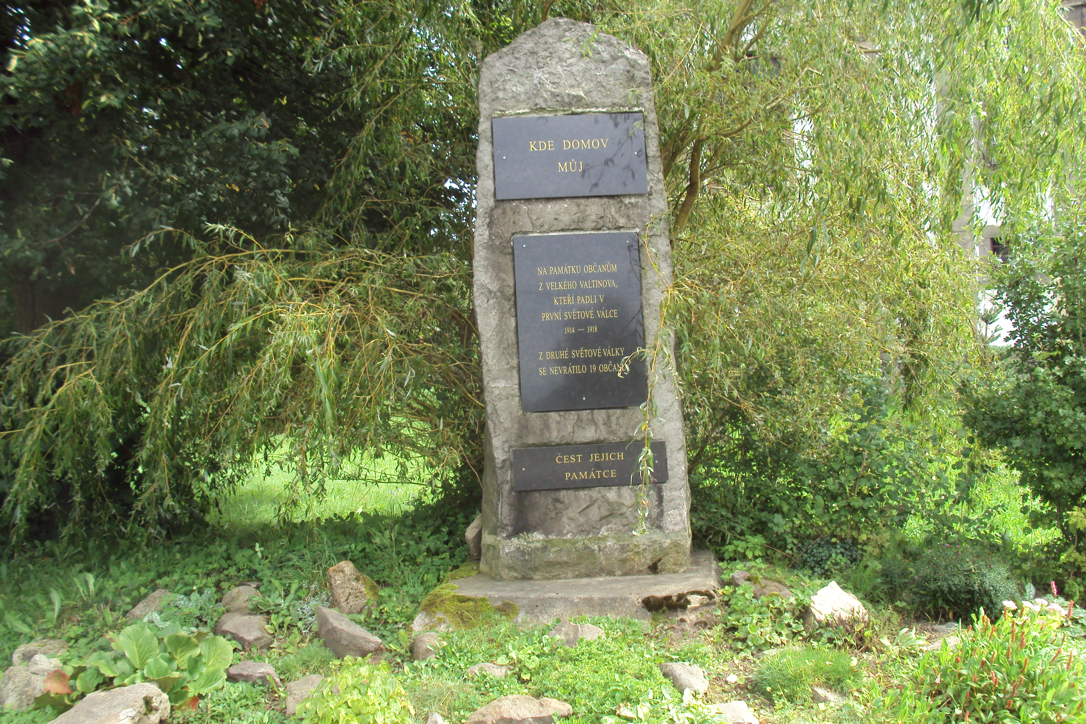 Památník obětem obou světových válek před kostelem, u hřiště